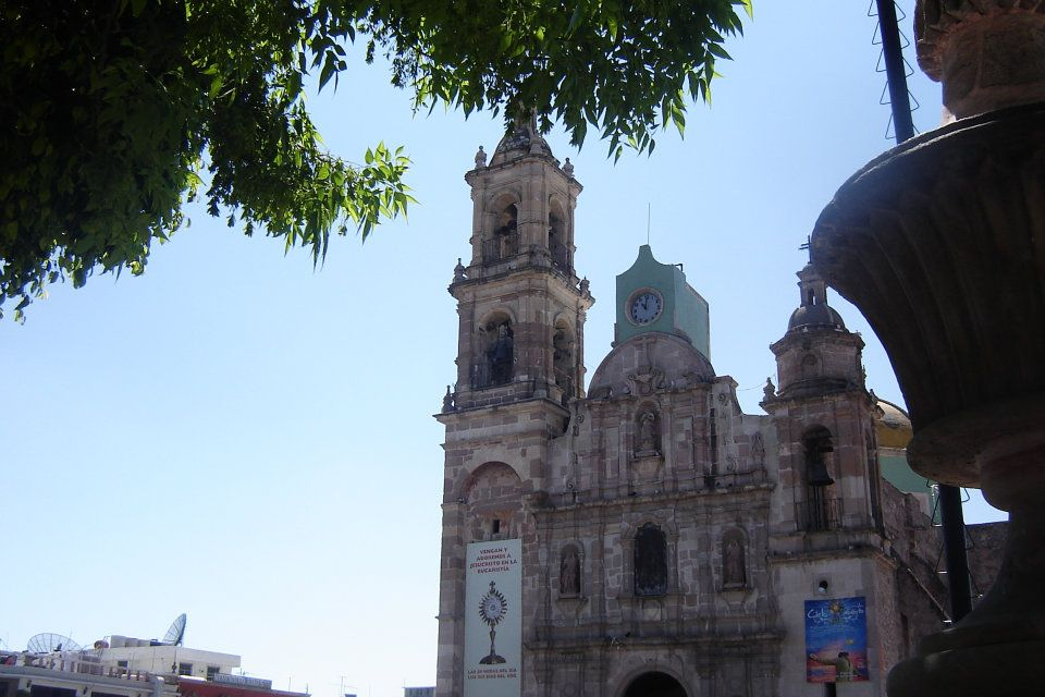 Templo del patrono